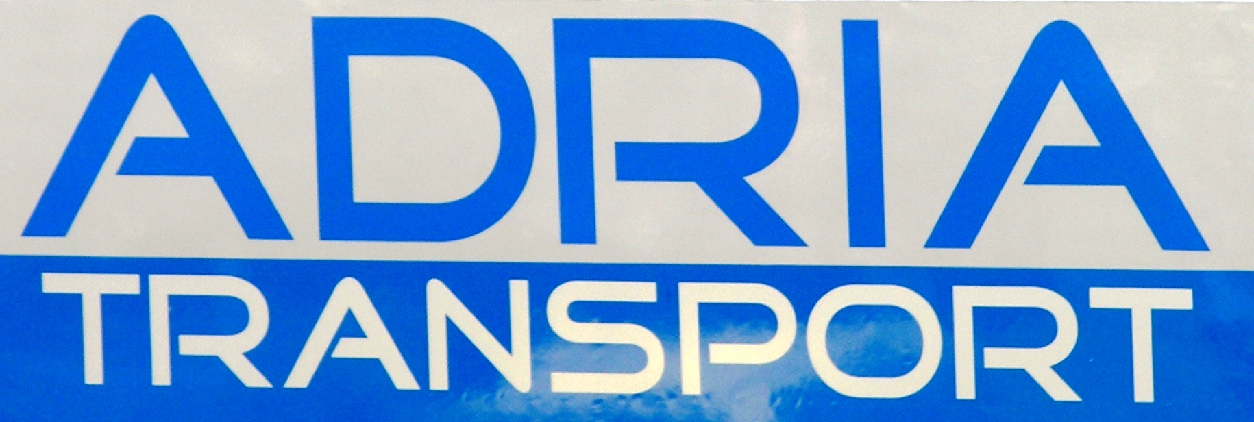 Logo der ADRIA TRANSPORT fotografiert von der ersten gelieferten Lok